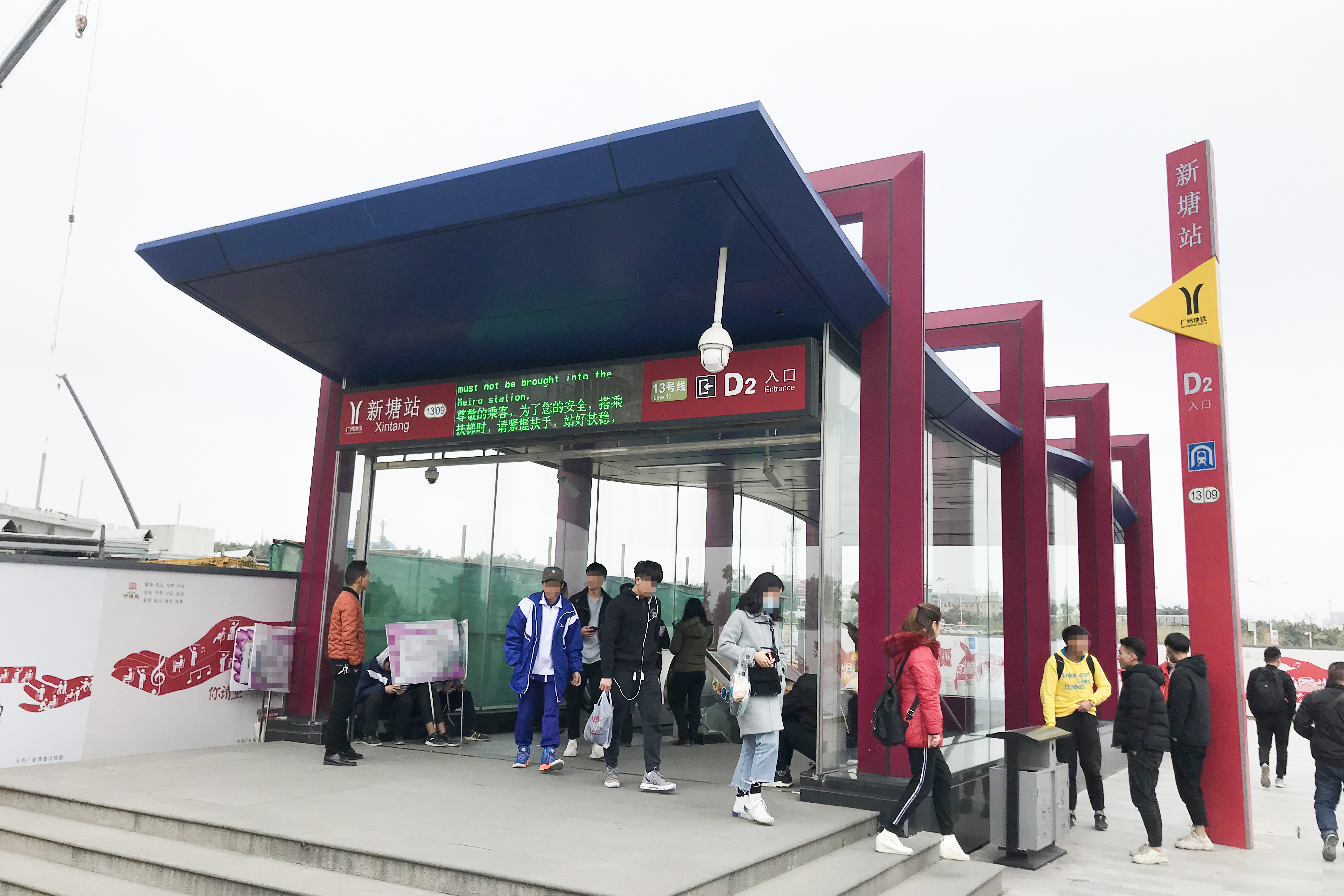 广州地铁新塘站